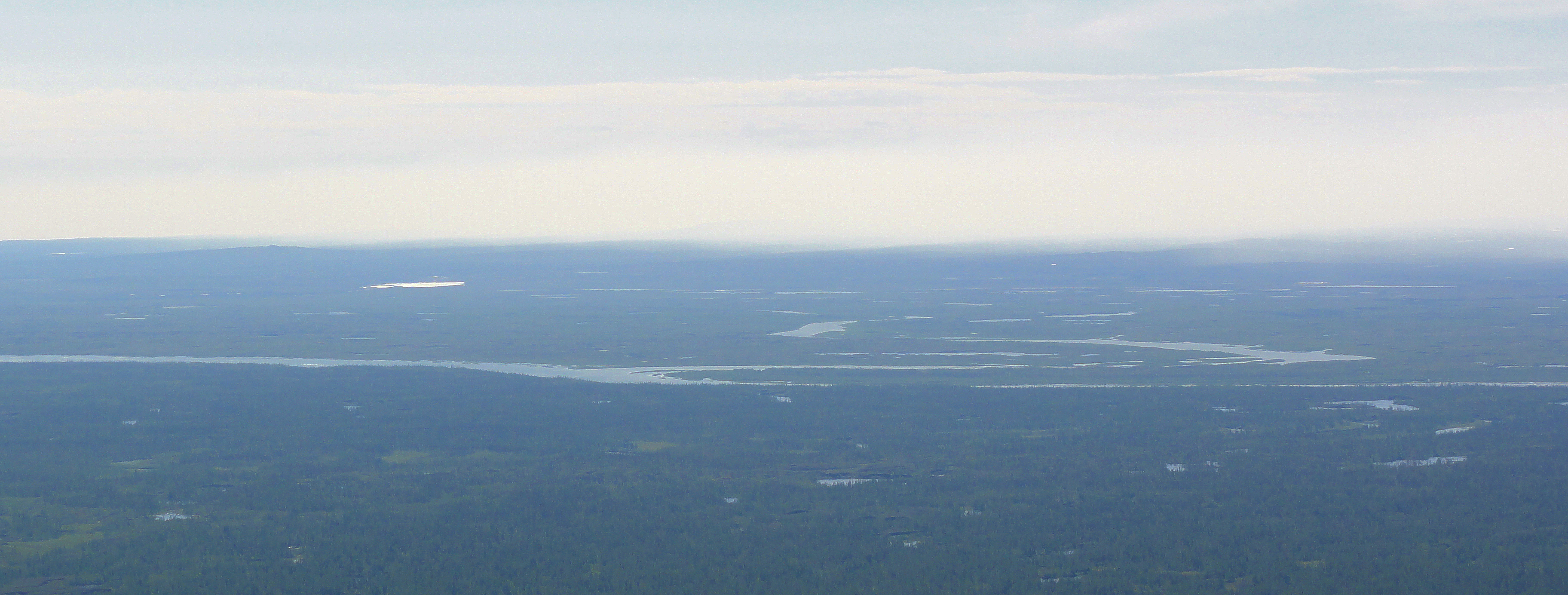 Впадение реки Рыбная в Норилку